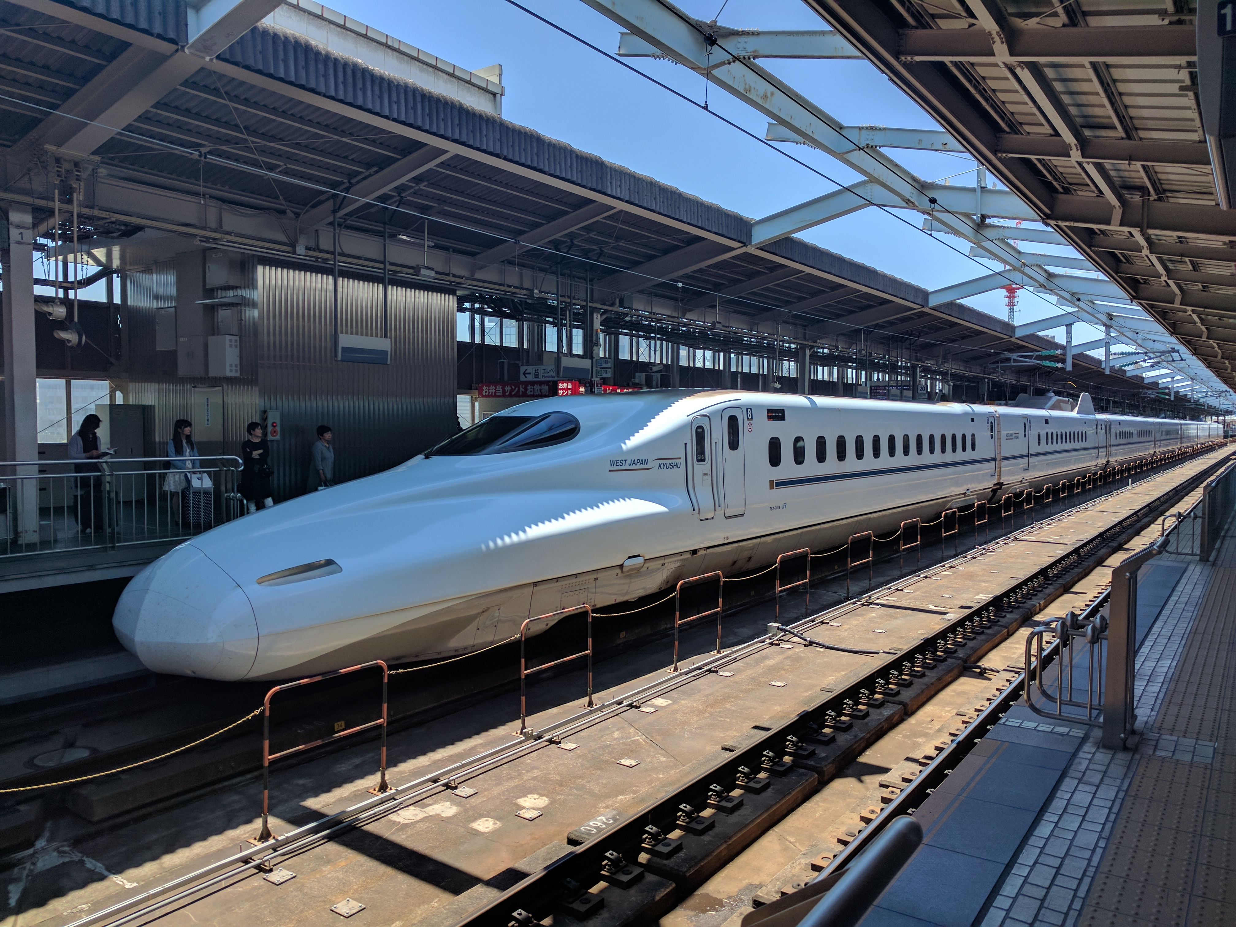 Sanyo Shinkansen N700-7000 S16 set at Shin-Osaka Station